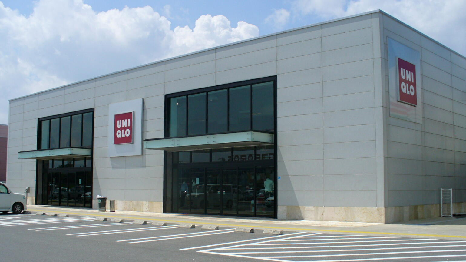 ユニクロ原町店